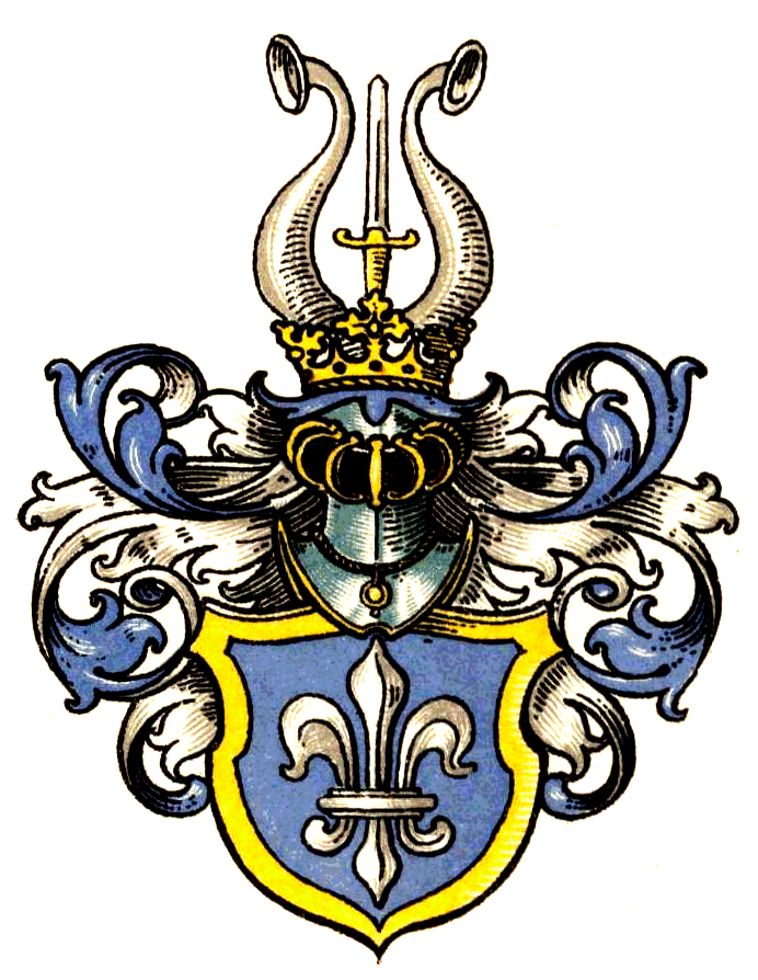 Wappen derer von Grolmann von 1786 und 1812 Das Wappen von 1786 und 1812 zeigt innerhalb eines goldenen Schildrandes in Blau eine silberne Lilie. Auf dem Helm mit blau-silbernen Decken ein aufgerichtetes goldbegrifftes blankes Schwert zwischen zwei silbernen Büffelhörnern.